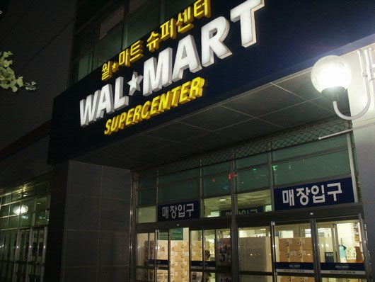 대한민국에 위치한 월마트. (현재 월마트는 대한민국에서 철수한 상태이다.)